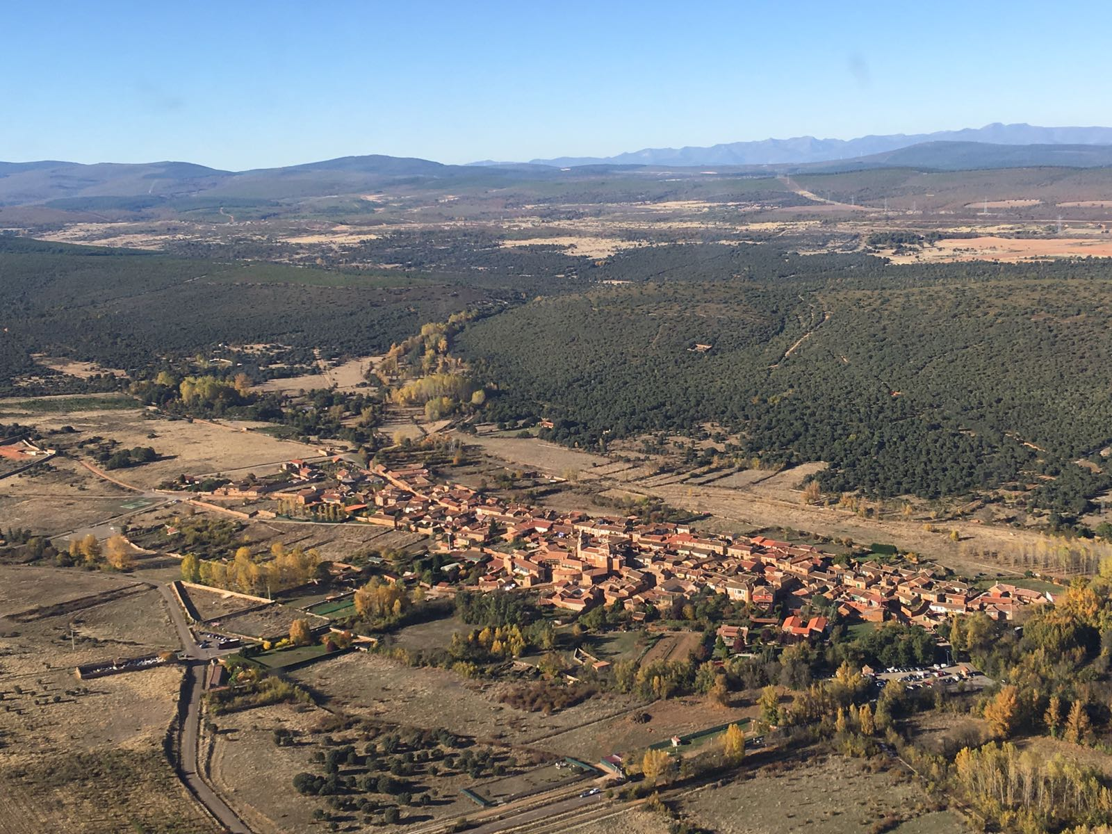 Vista aérea de Castrillo de los Polvazares (León, España).